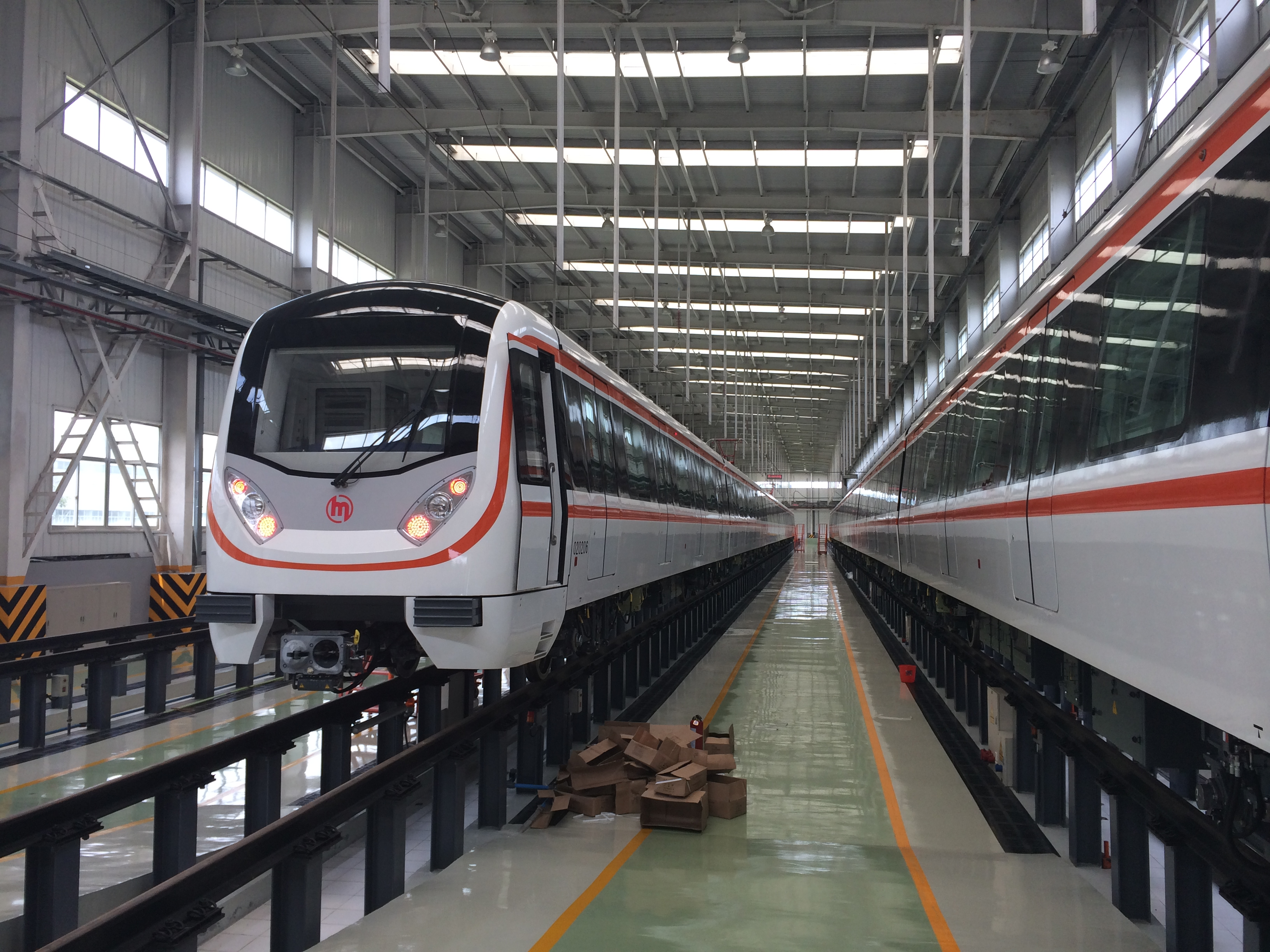 杭州南车工厂内的杭州地铁2号线列车